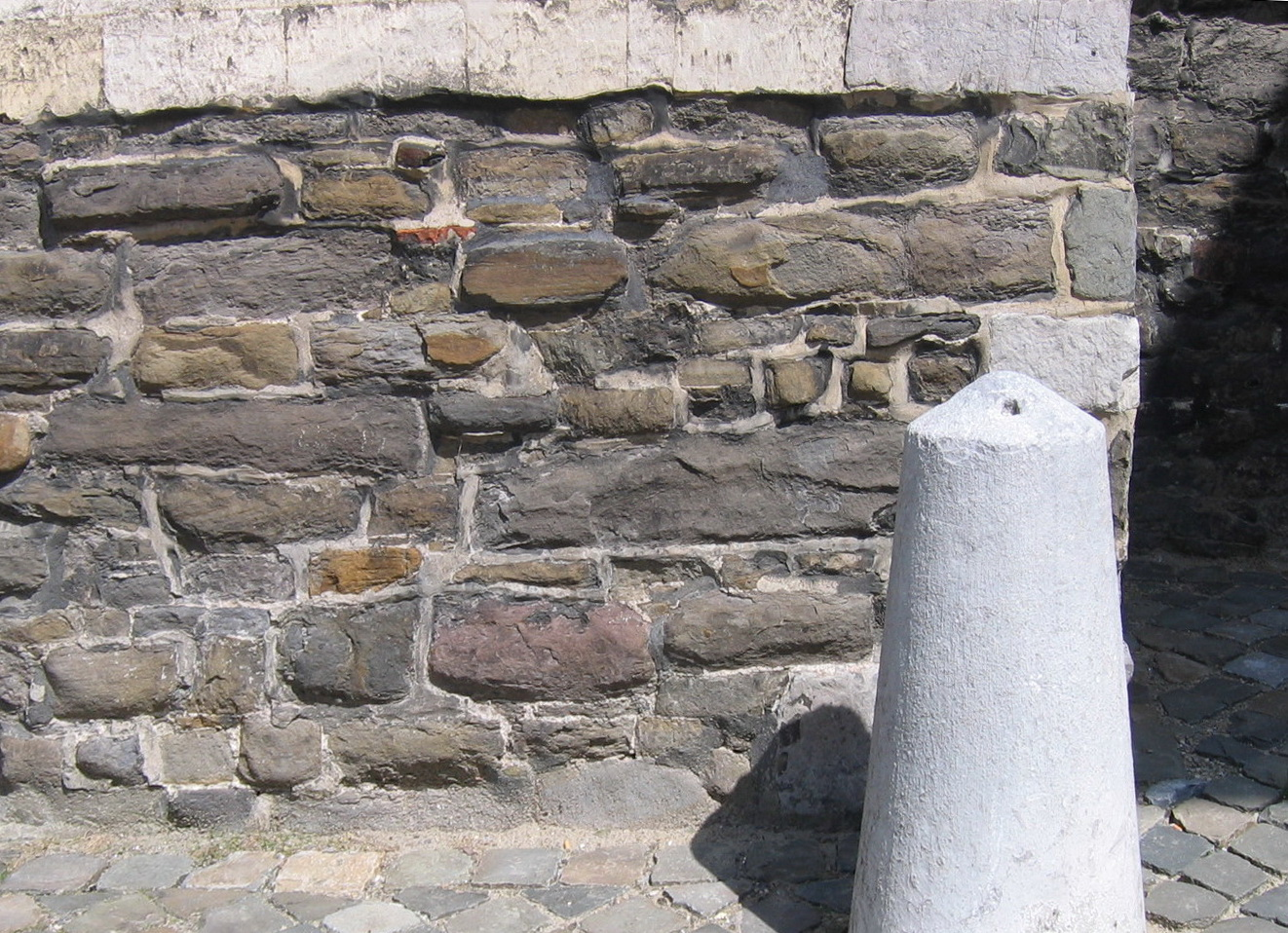 Voormalige FRANCISCANENKERK EN -KLOOSTER, tegenwoordig Rijksarchief. Gotische kerk met basilicaal schip, 1298? en een eenbeukig koor, XV. In de moderne archiefgebouwen zijn gedeelten opgenomen van de vroegere kruisgang. Verder is er nog een oud gedeelte vrijstaand ten zuidoosten van de kerk.